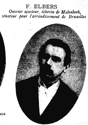 Portrait photographié de Ferdinand Elbers (1862-1943), ouvrier ajusteur, échevin de Molenbeek, sénateur pour l'arrondissement de Bruxelles